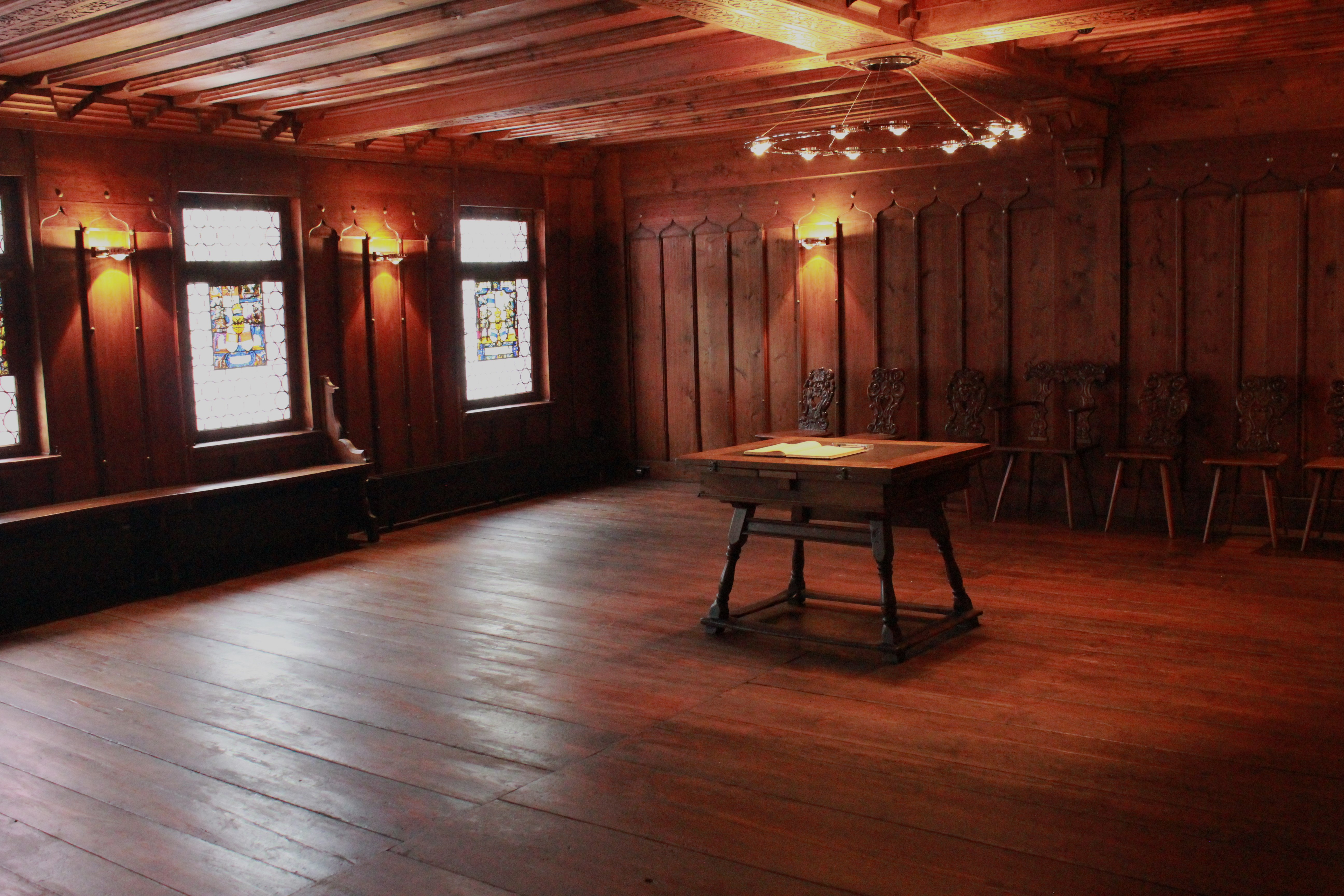 Der Bürgersaal im Rathaus von Sempach ist eine repräsentative Holzstube mit Kabinettscheiben aus dem 17. Jahrhundert.